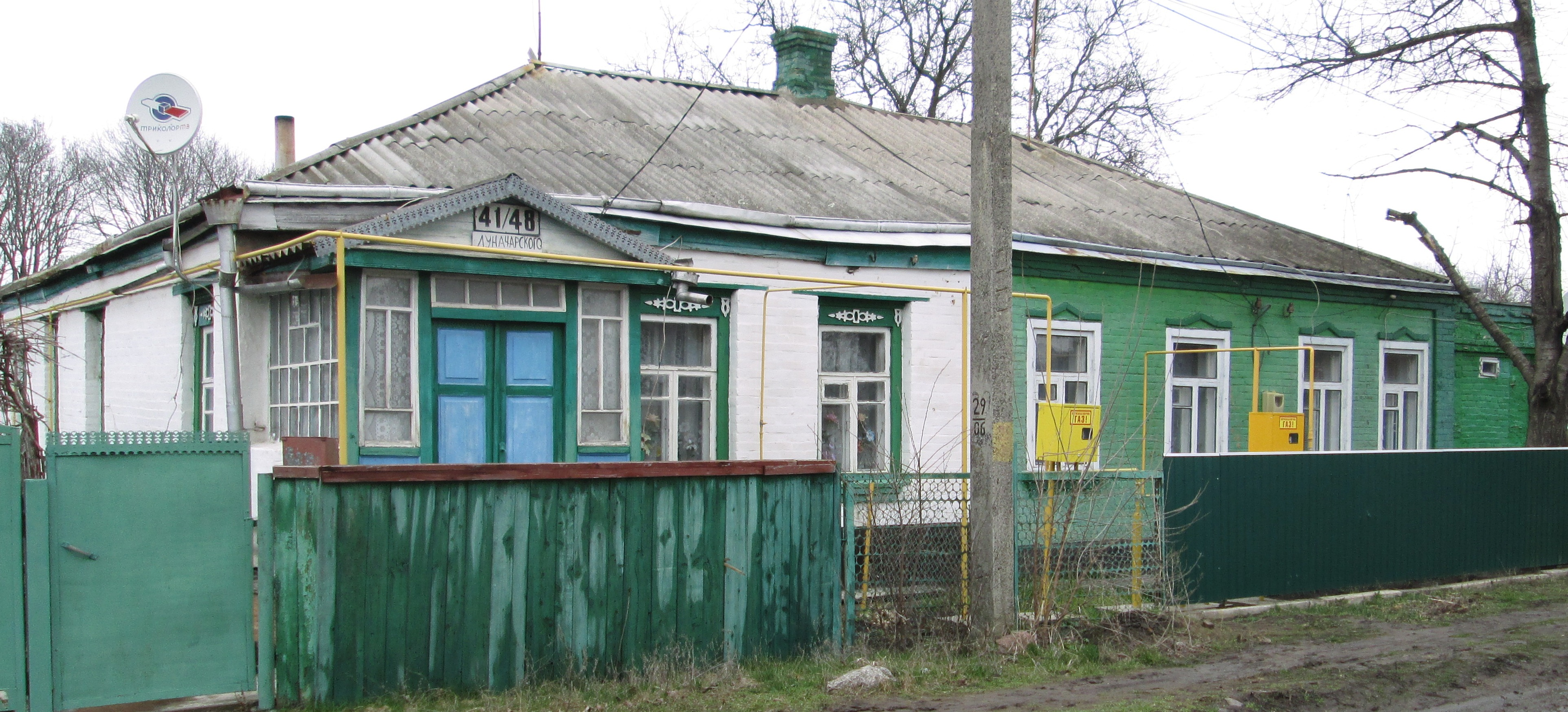 Златопіль. Вул. Зерова, 41